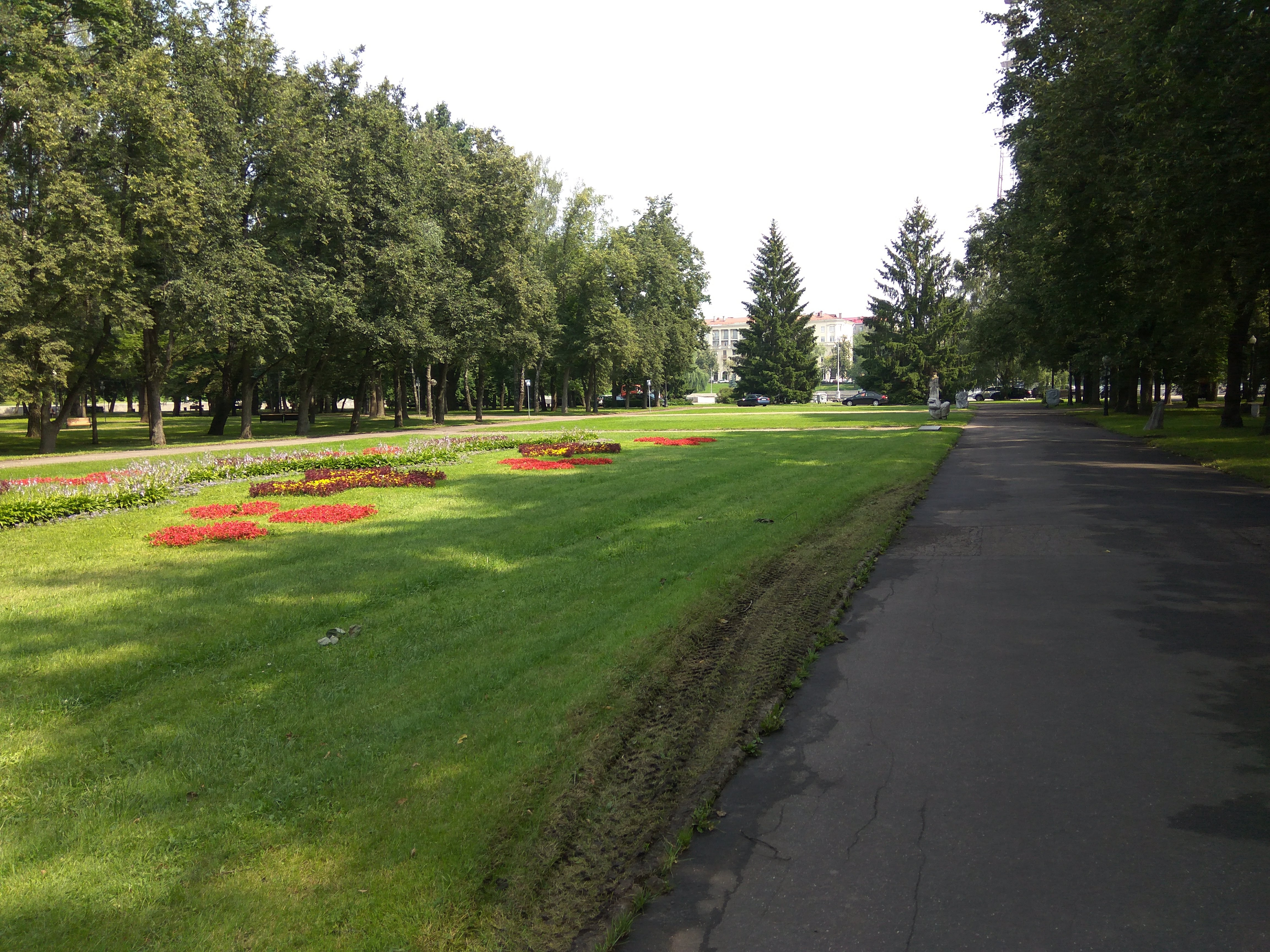 Мінск. Парк Янкі Купалы